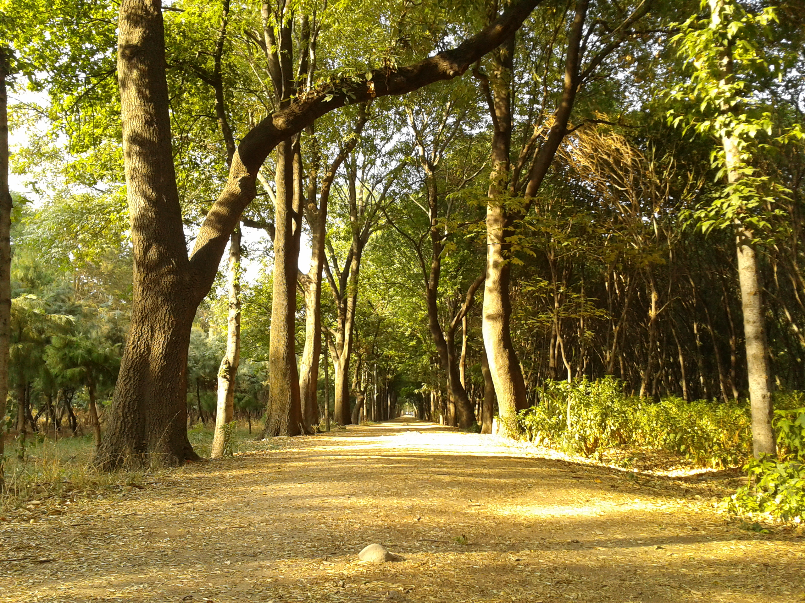 Una tarde en los viveros